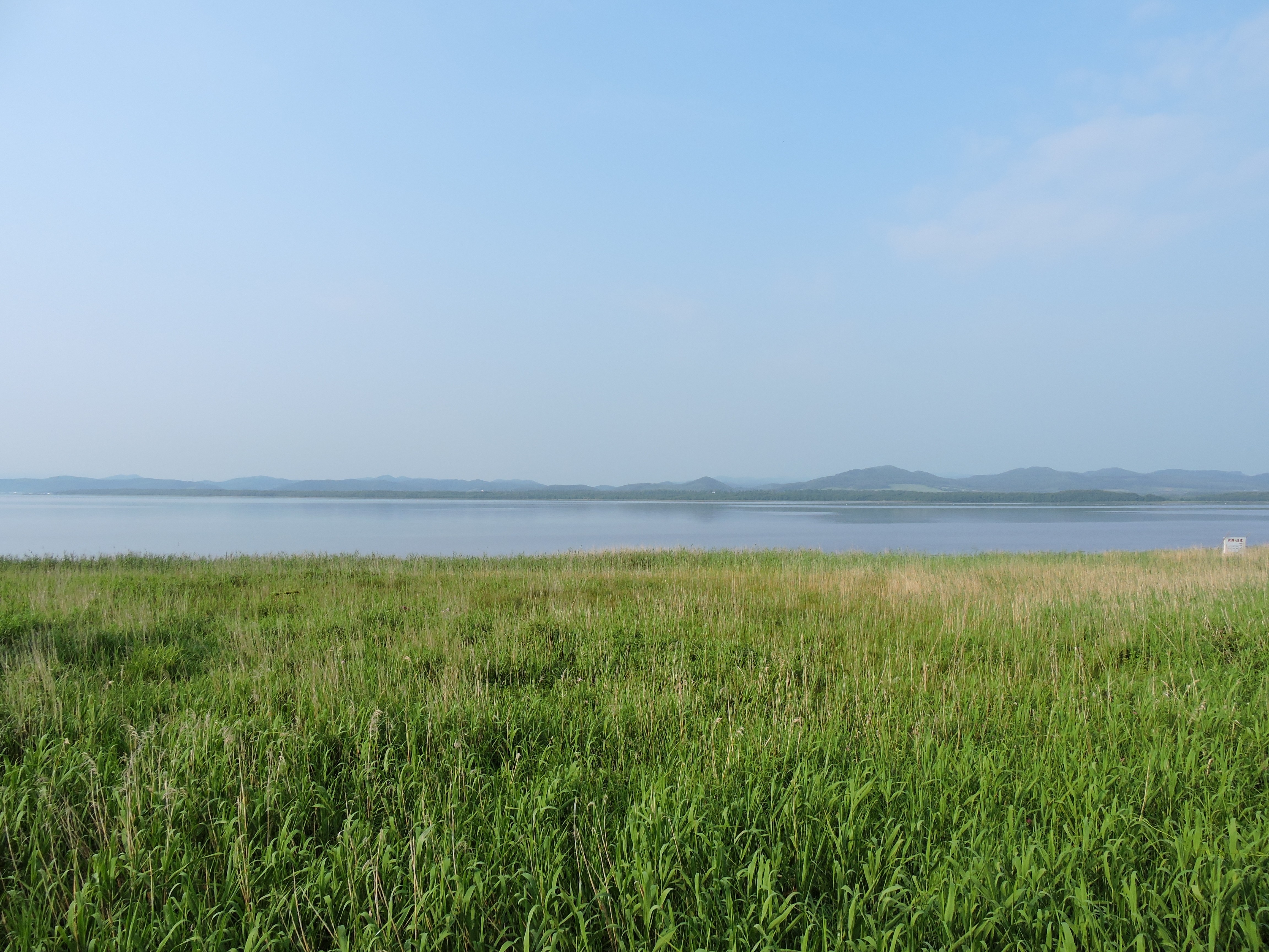 サロマ湖東側砂嘴